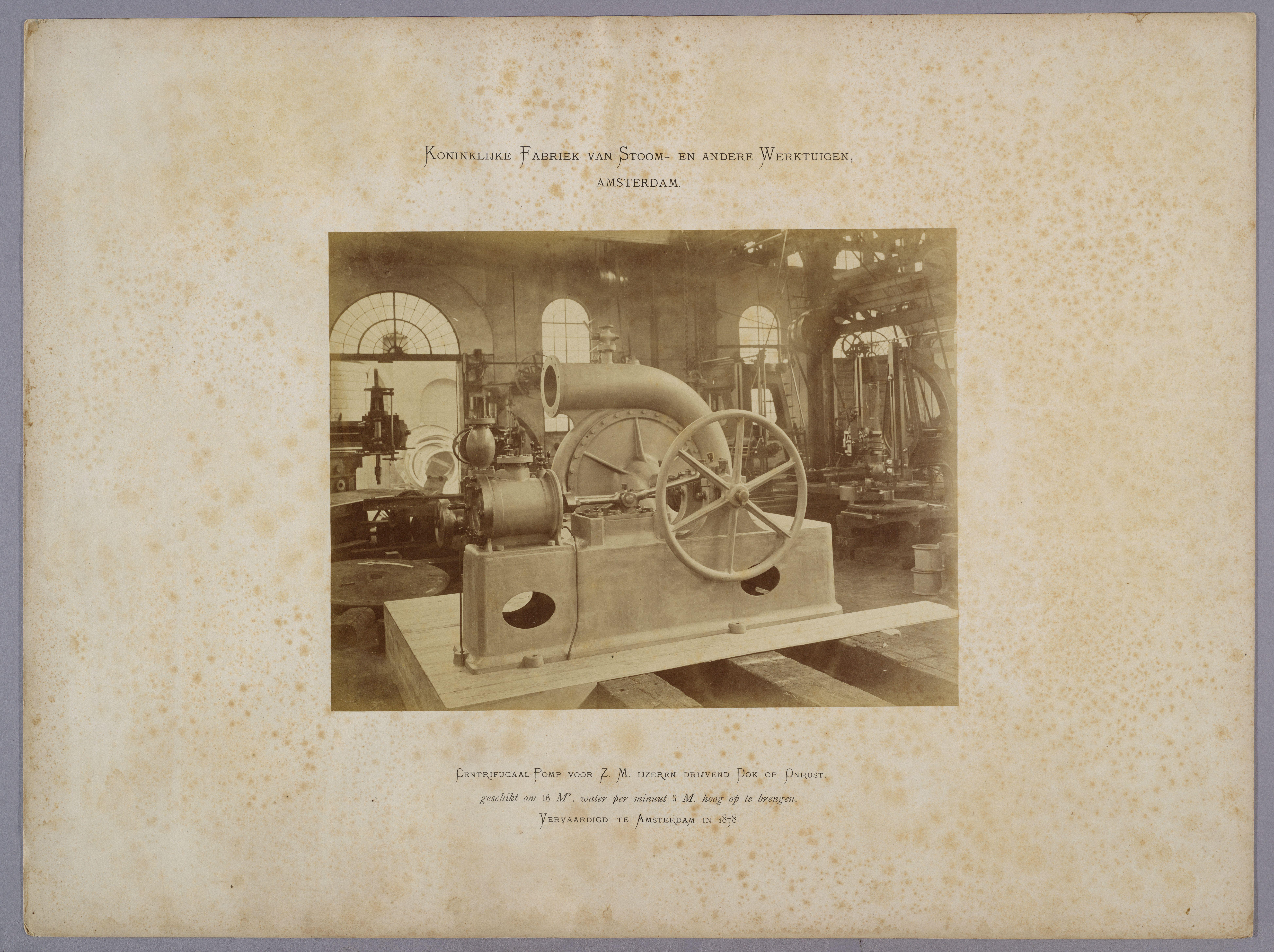 Beschrijving Centrifugaal-Pomp Opgesteld in de werkplaats van de Koninklijke Fabriek van Stoom- en andere Werktuigen, Oostenburgergracht 73 en bestemd voor Z.M. ijzeren drijvend Dok op Onrust, geschikt om 16 m3 water per minuut 5 meter hoog op te brengen. De foto maakt deel uit van een reeks foto's die Pieter Oosterhuis en zijn zoon Gustaaf maakten in opdracht van de Koninklijke Fabriek, het latere Werkspoor. Serie: Oosterhuis, Koninklijke Fabriek van Stoom- en andere Werktuigen Documenttype foto Vervaardiger Oosterhuis, Pieter Collectie Collectie Richardus Datering 1878 Inventarissen Afbeeldingsbestand 010003025143 Generated with Dememorixer